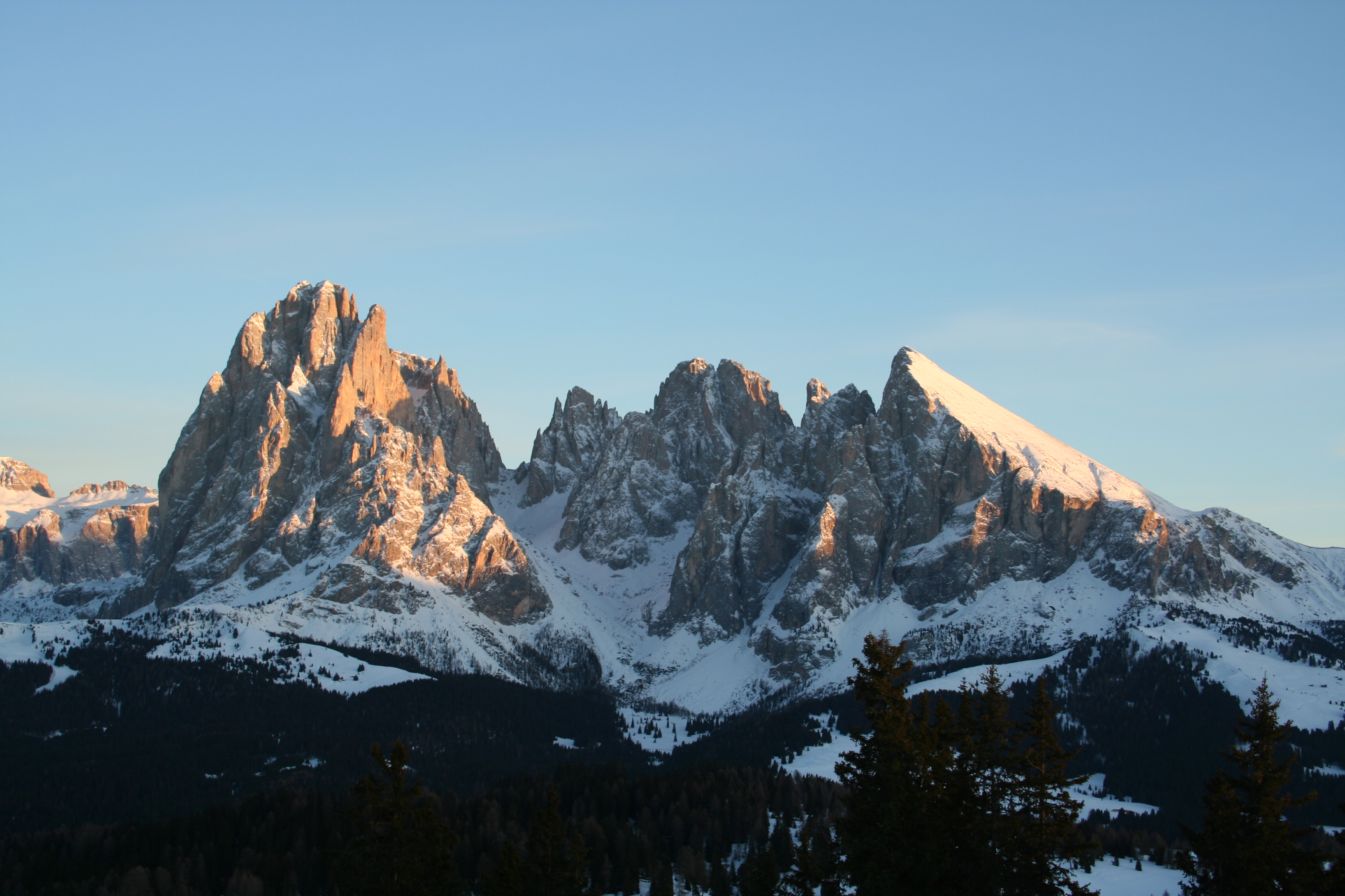 Langkofelgruppe im Abendrot im Februar 2006 Lld: Saslonch